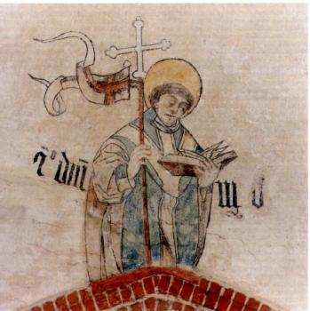 Fresco van Sint-Lebuïnus